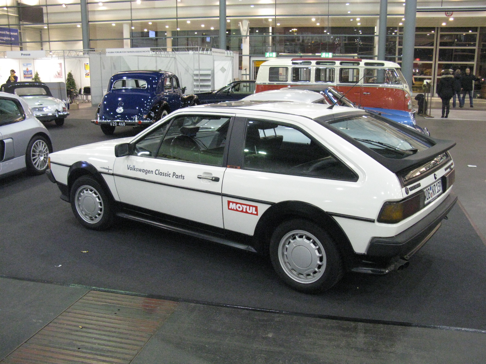 Volkswagen Scirocco GTi 16 Valve